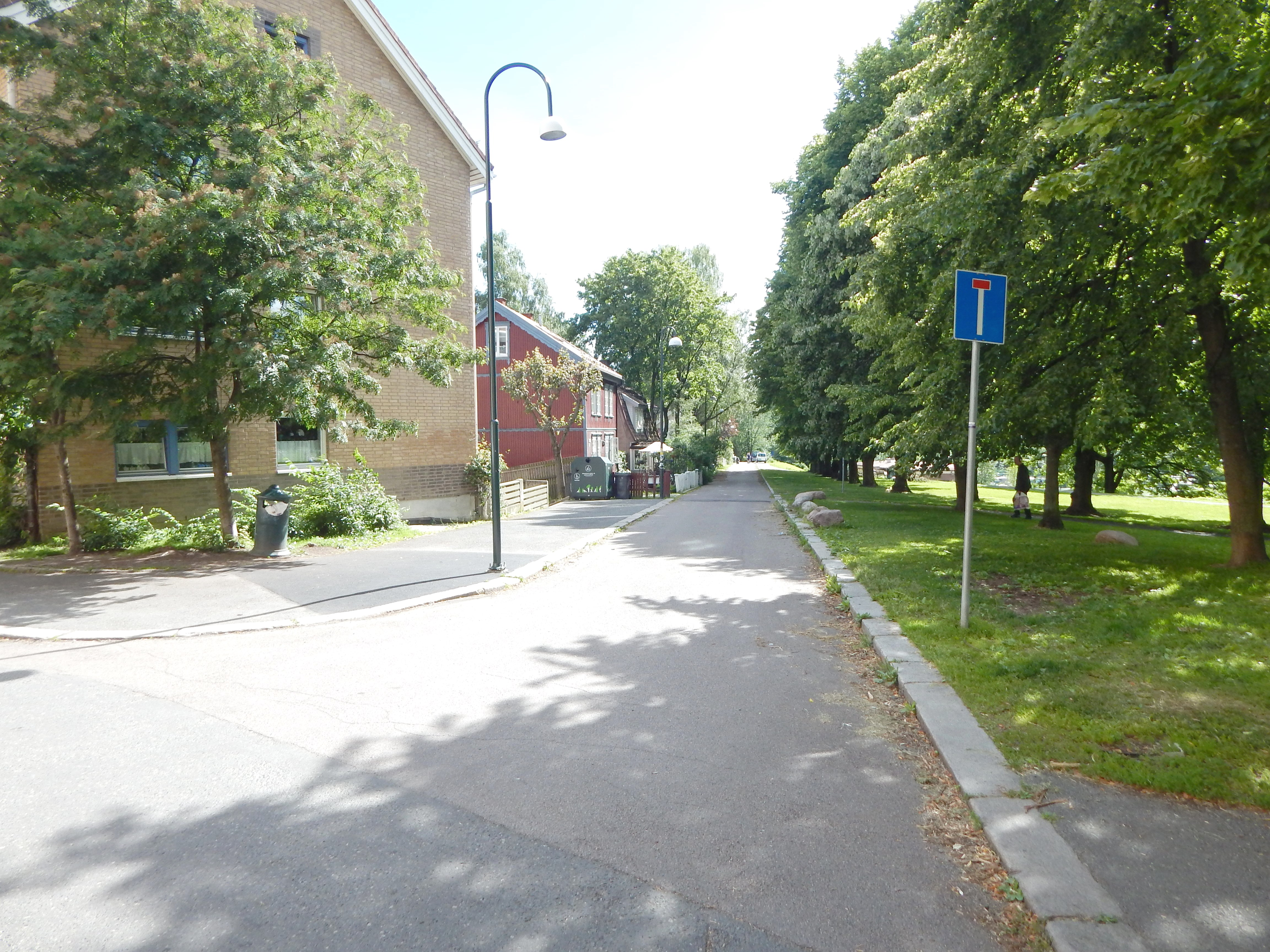 Odalsgata sett fra Hedmarksgata